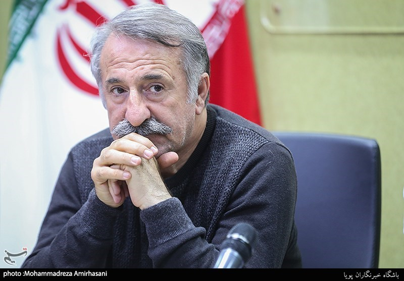 مهران رجبی در سال 1398